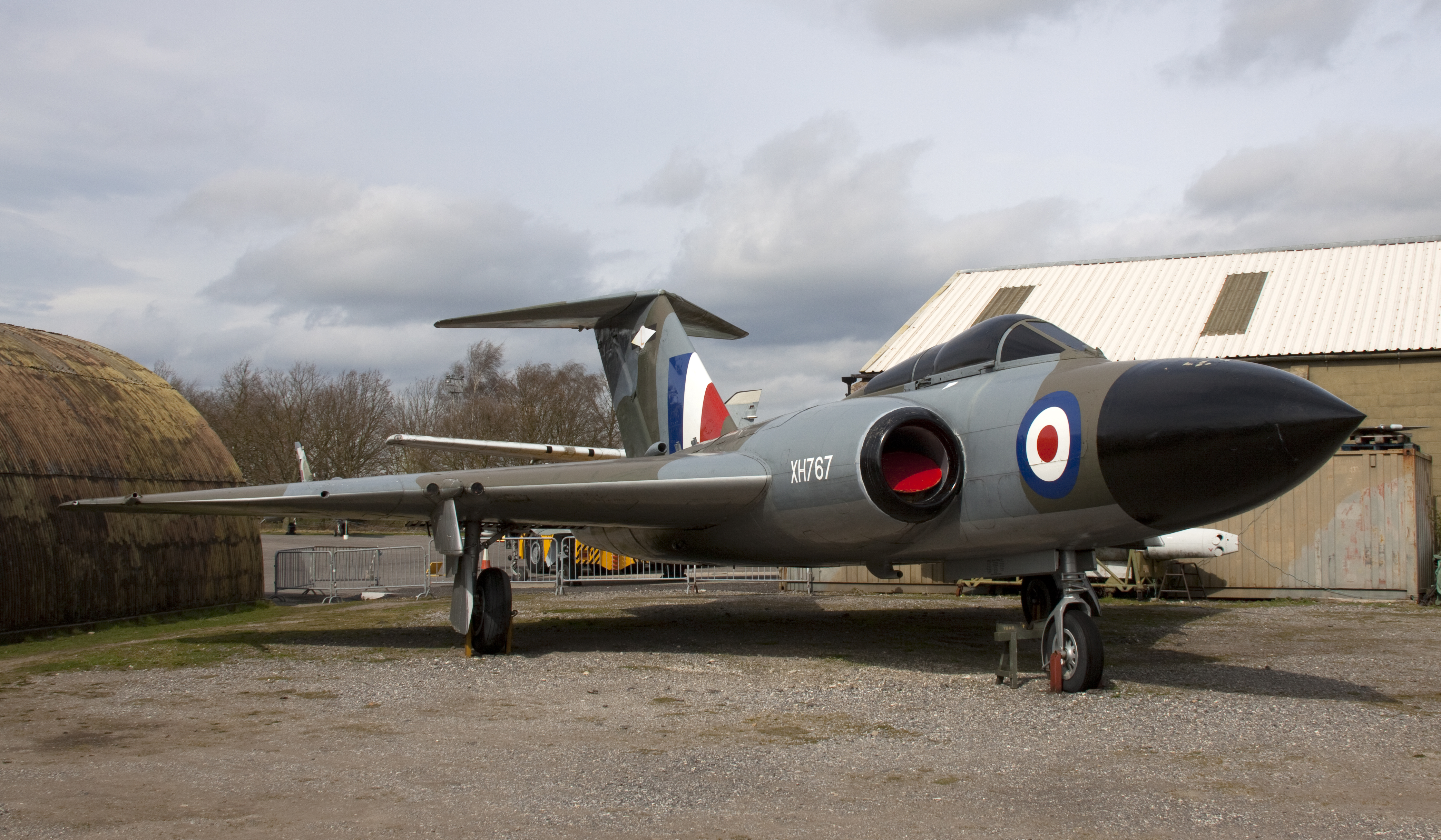 Javelin